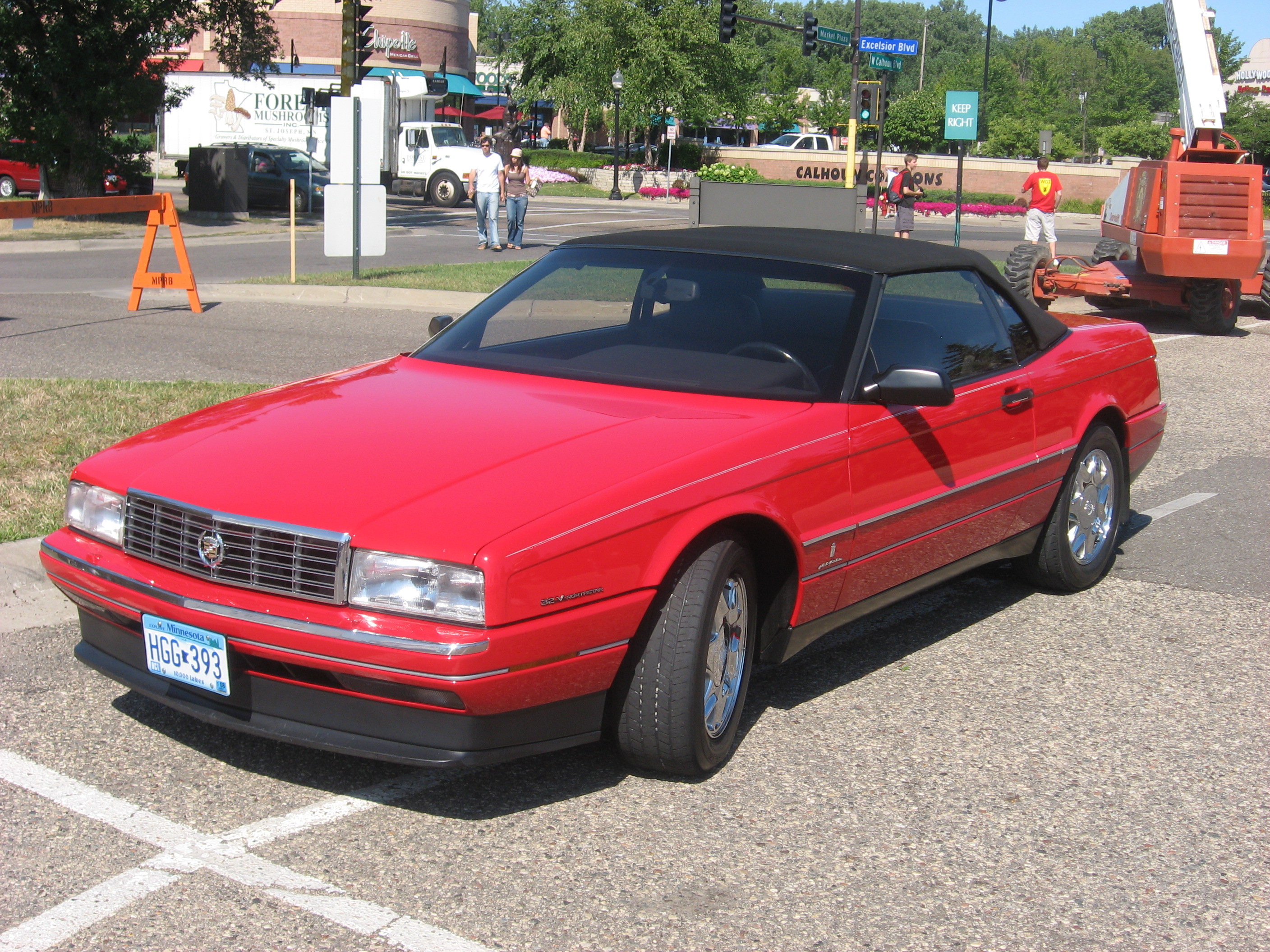 Cadillac Allante